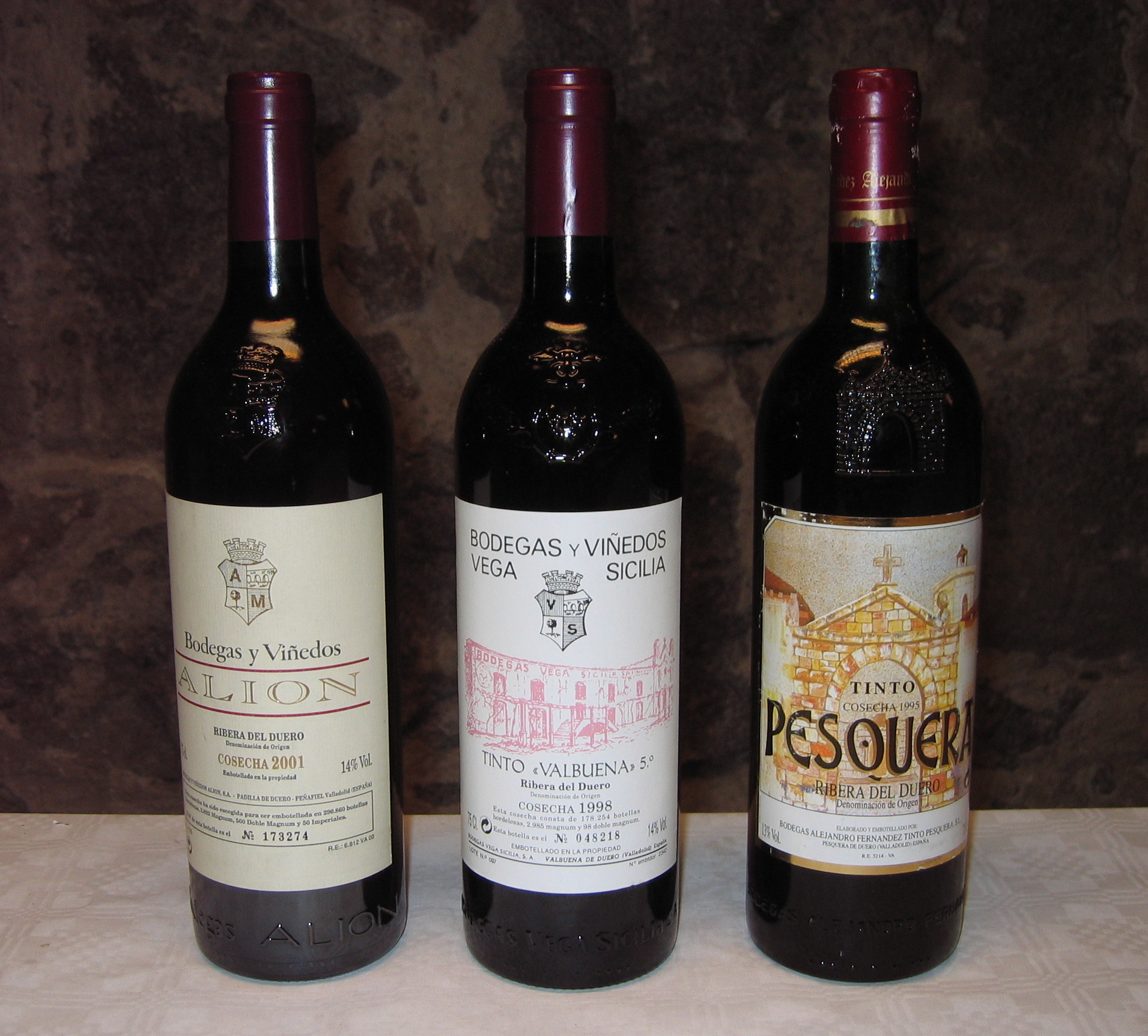 Trio of Ribera del Duero wine bottles: Alion 2001, Valbuena 5° 1998, Pesquera Crianza 1995